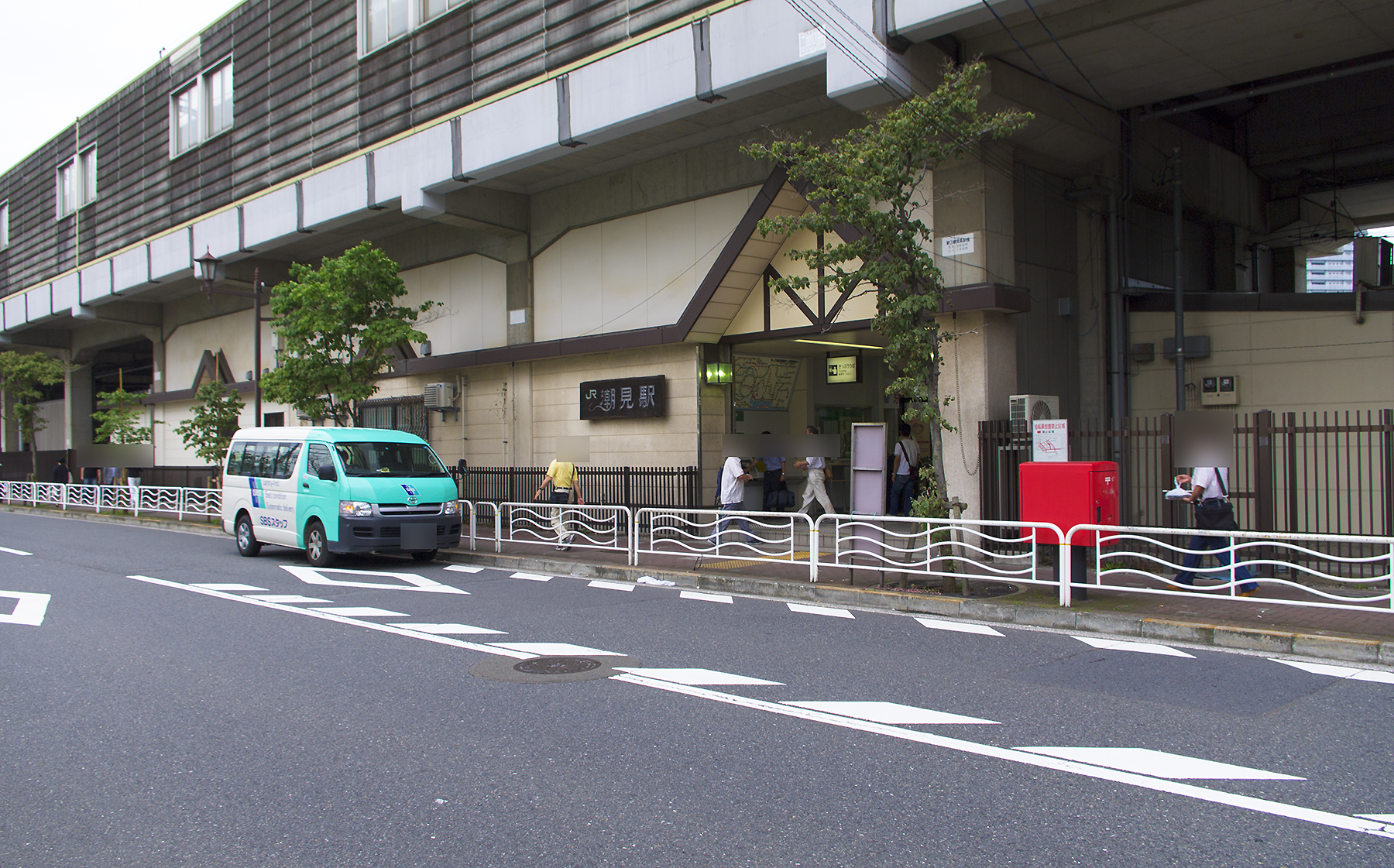 東日本旅客鉄道株式会社京葉線潮見駅